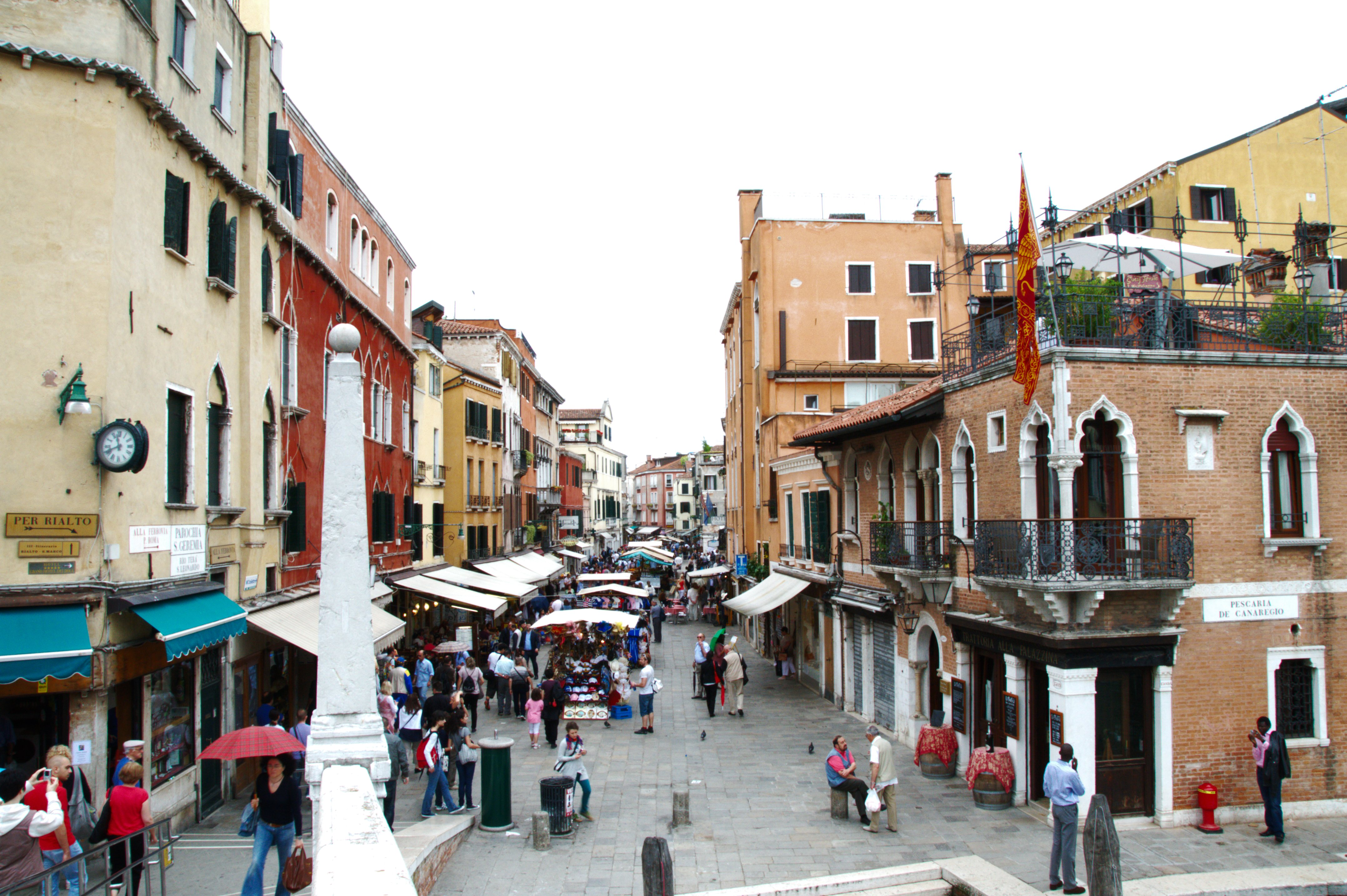 venezia venice veneto italia italy travel creative commons cc gnuckx panoramio flickr geotag wiki wikipedia